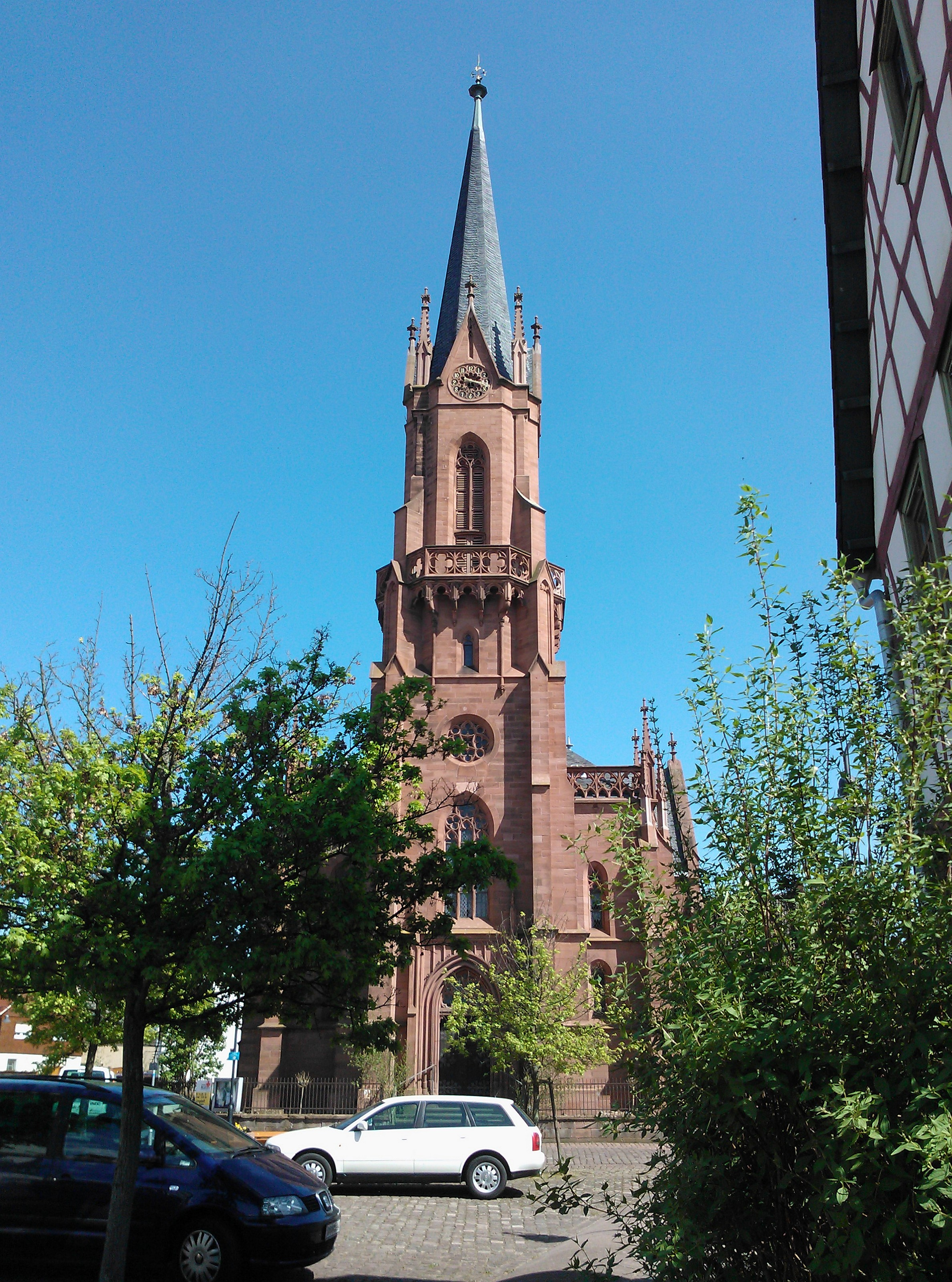 Blick auf das Eingangsportal der neugotischen Kirche in Langstadt, heute Stadtteil von Babenhausen